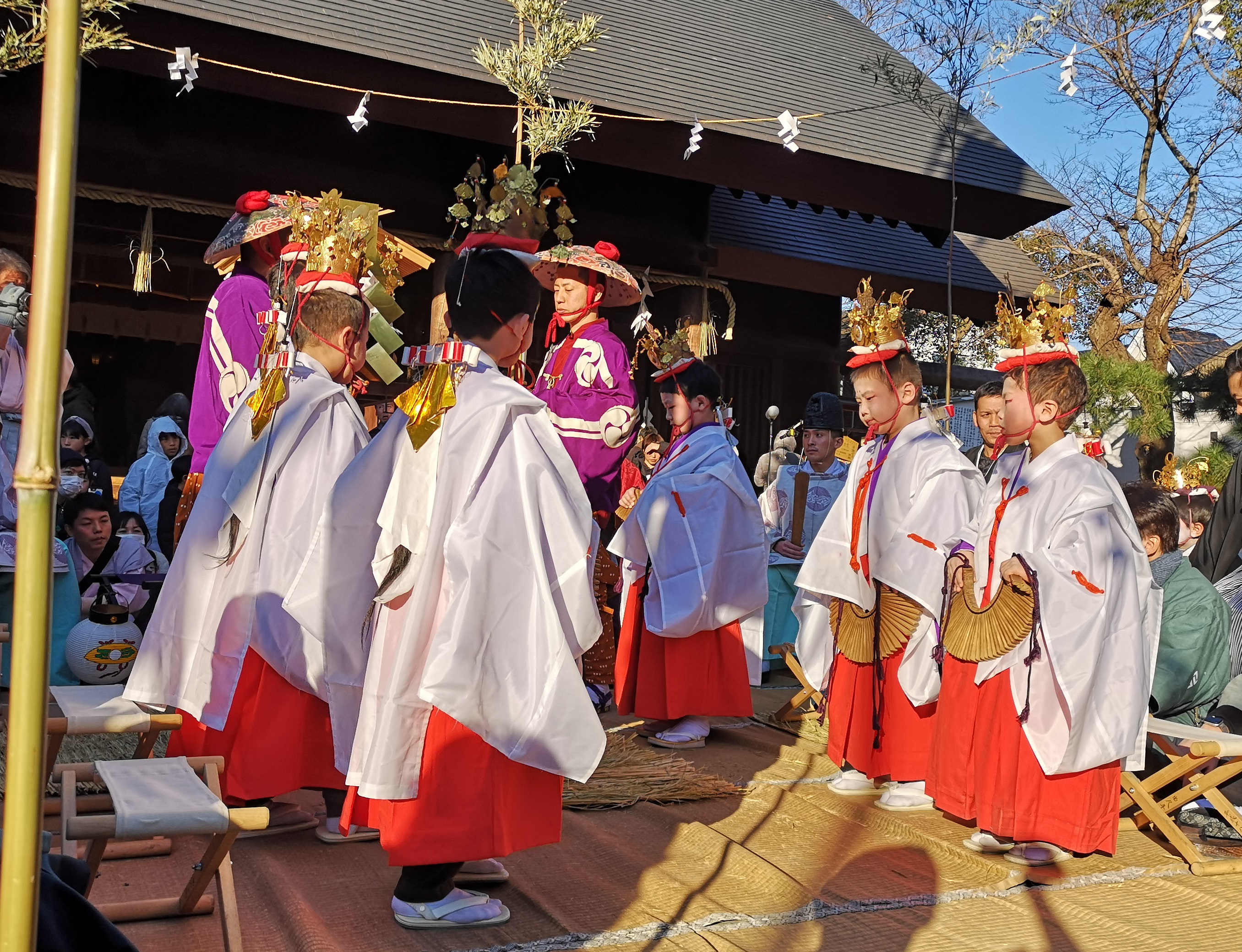 愛知県豊橋市の安久美神戸神明社の例祭「鬼祭」における司天師と笹良児の「ポンテンザラ」